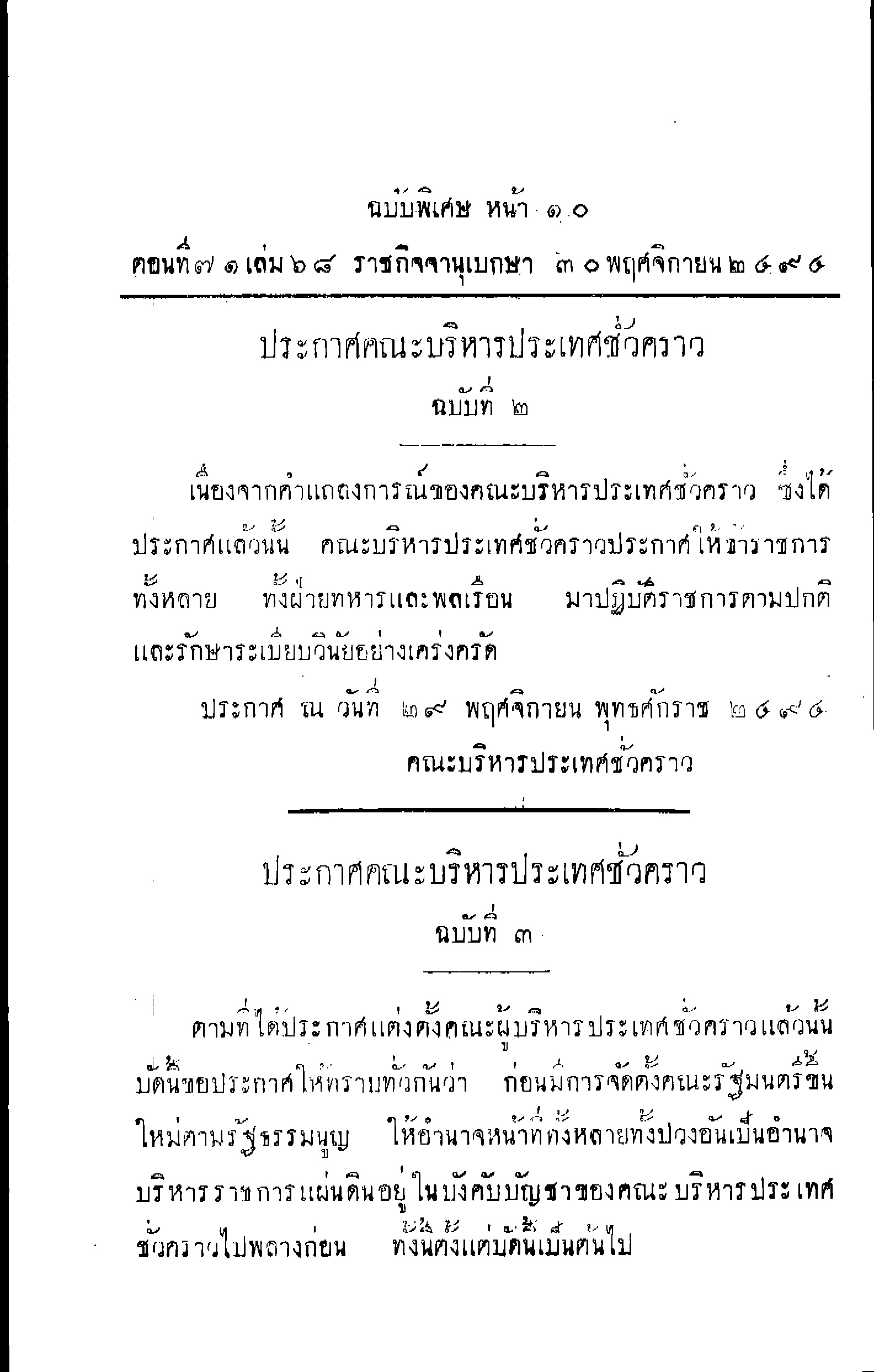 ประกาศคณะบริหารประเทศชั่วคราว ฉบับที่ 2 และ 3